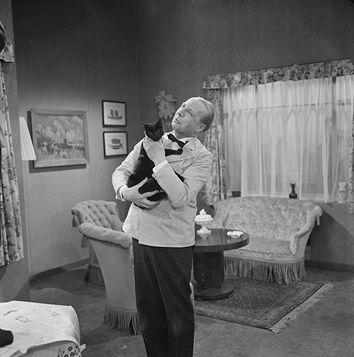 Arend Hauer